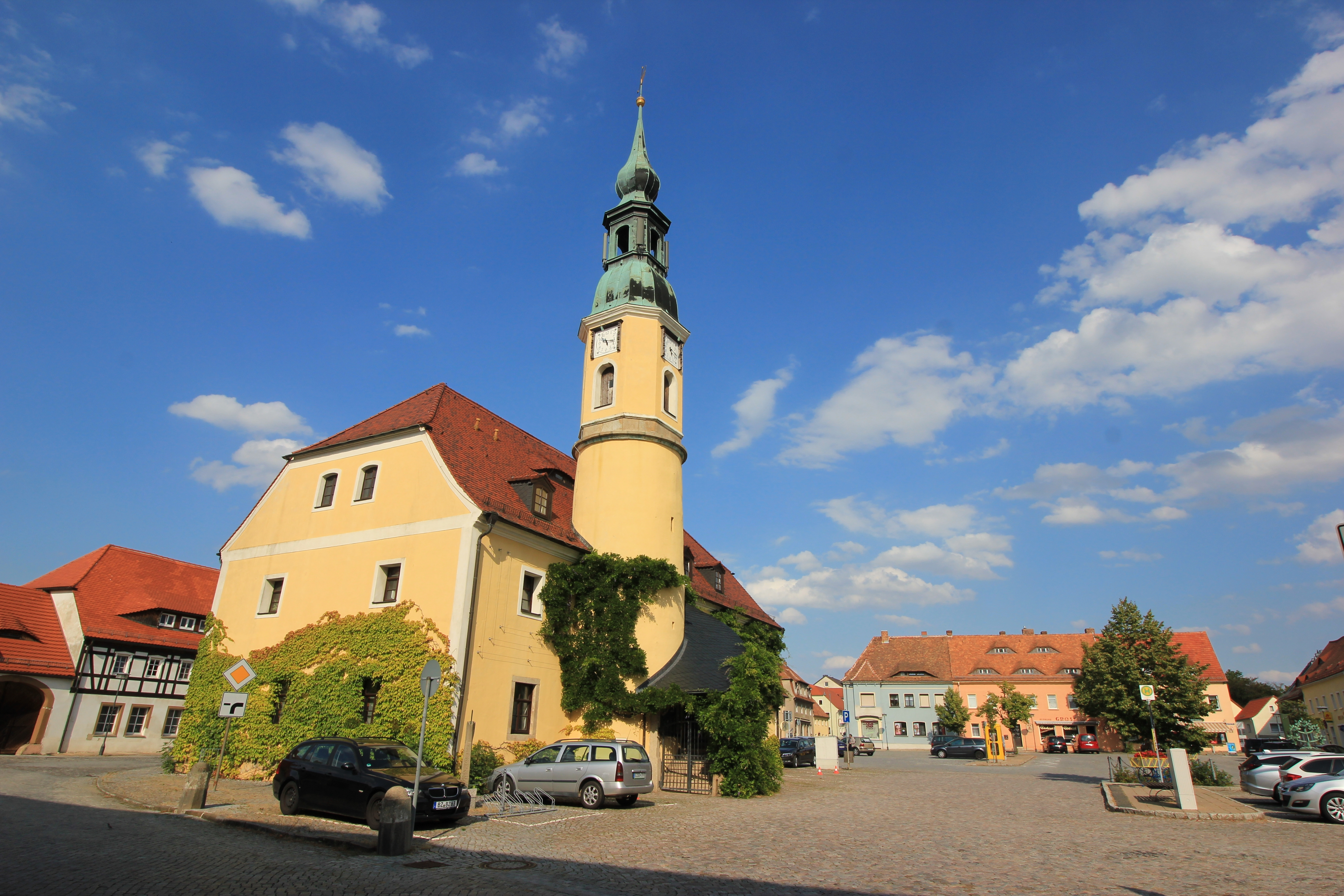 Hornjoserbsce: Radnica na Wósporskim torhošću